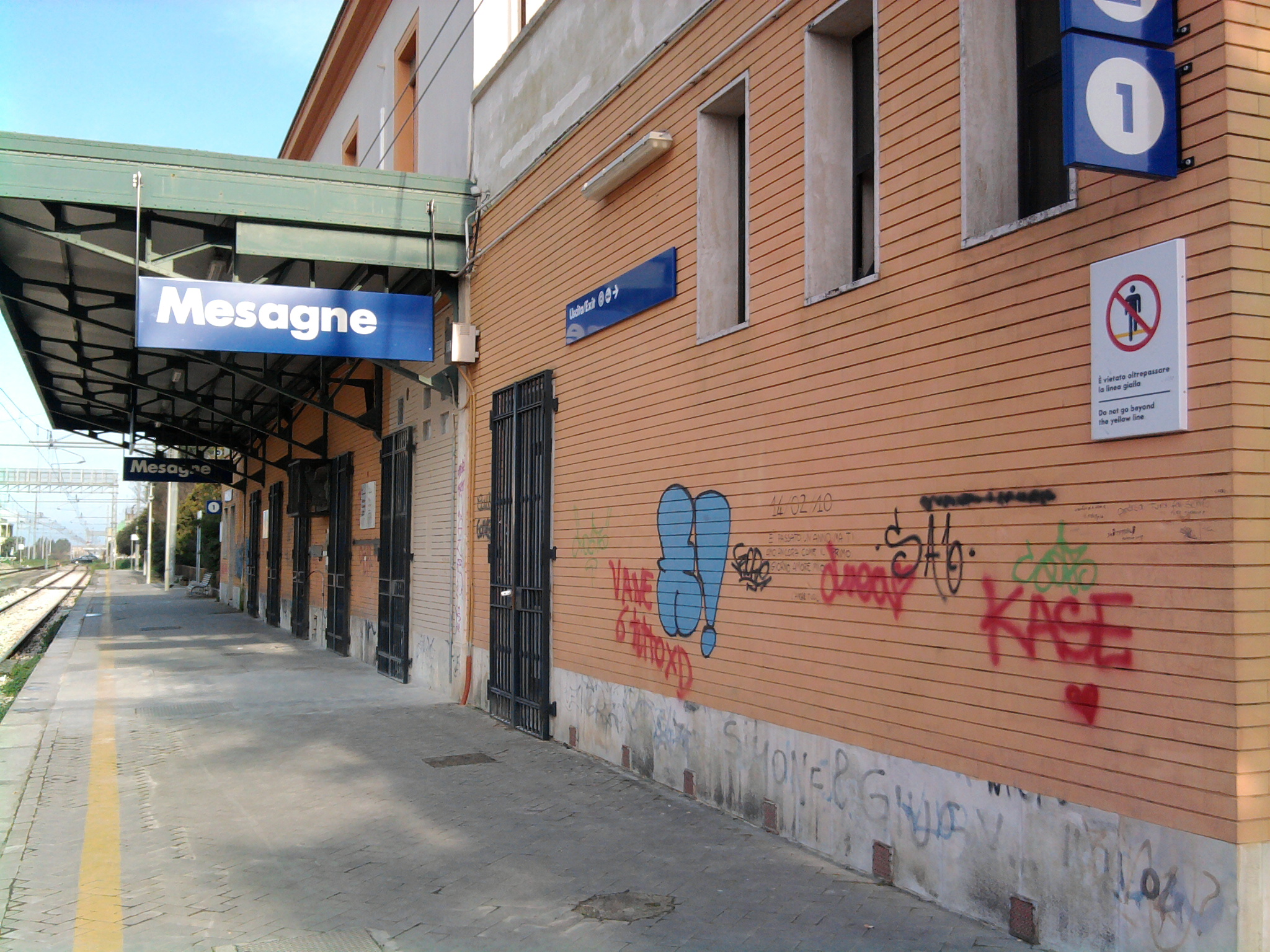 Stazione di Mesagne